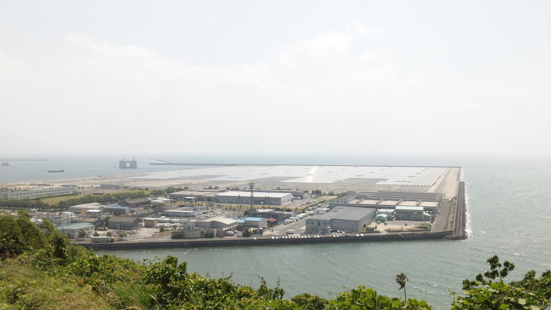 鹿児島七ツ島メガソーラー発電所の画像